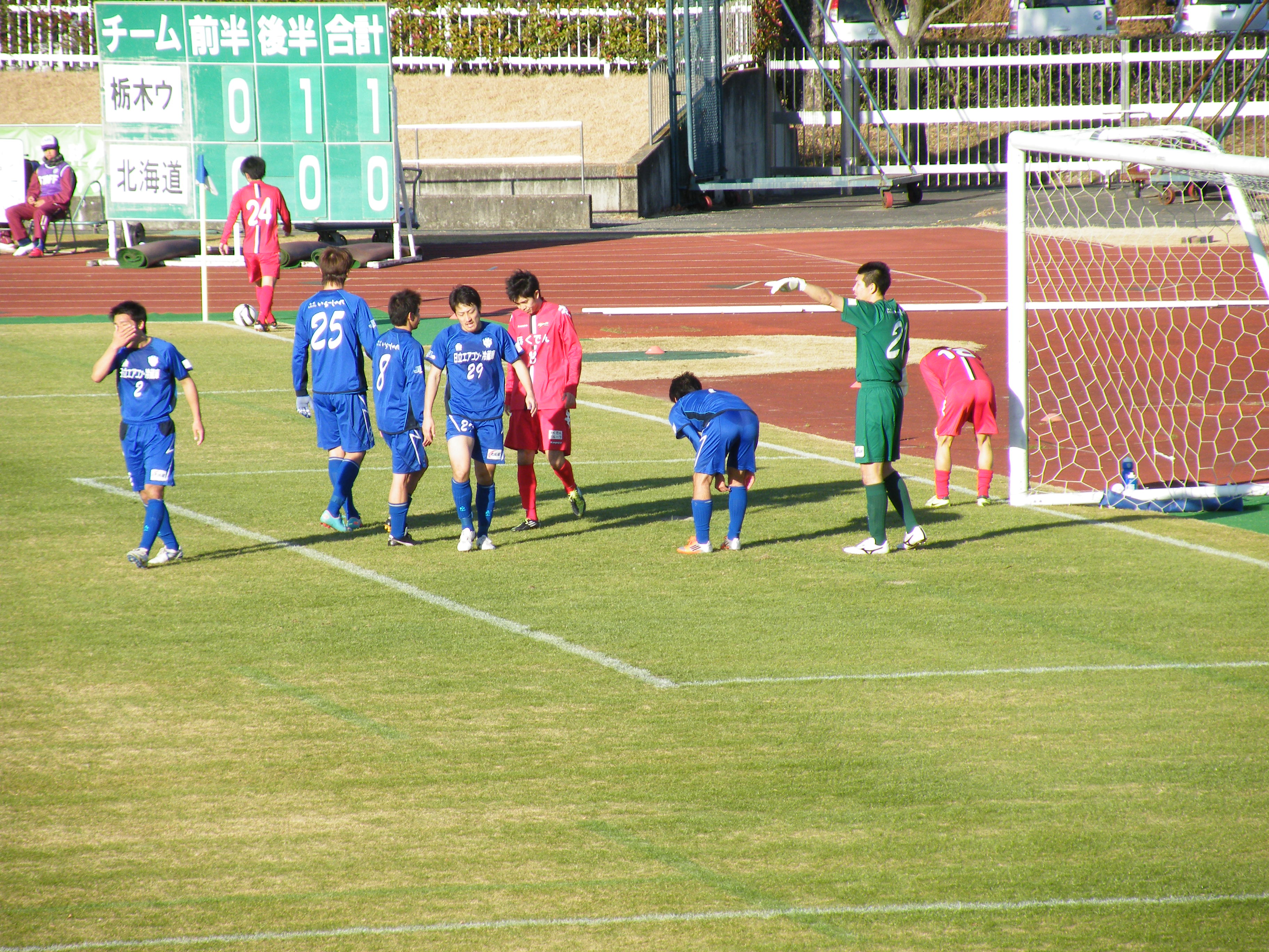 2012年のJFL/地域リーグ入替戦(第2戦)。於 栃木市総合運動公園陸上競技場[栃木市](栃木県栃木市川原田町760) 栃木ウーヴァＦＣ(青) v. ノルブリッツ北海道(赤)